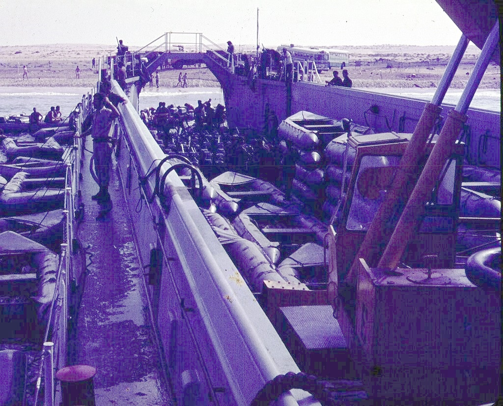 נחתת נושאית את סירות הגומי מאשדוד אל חוף ההיערכות בסיני.